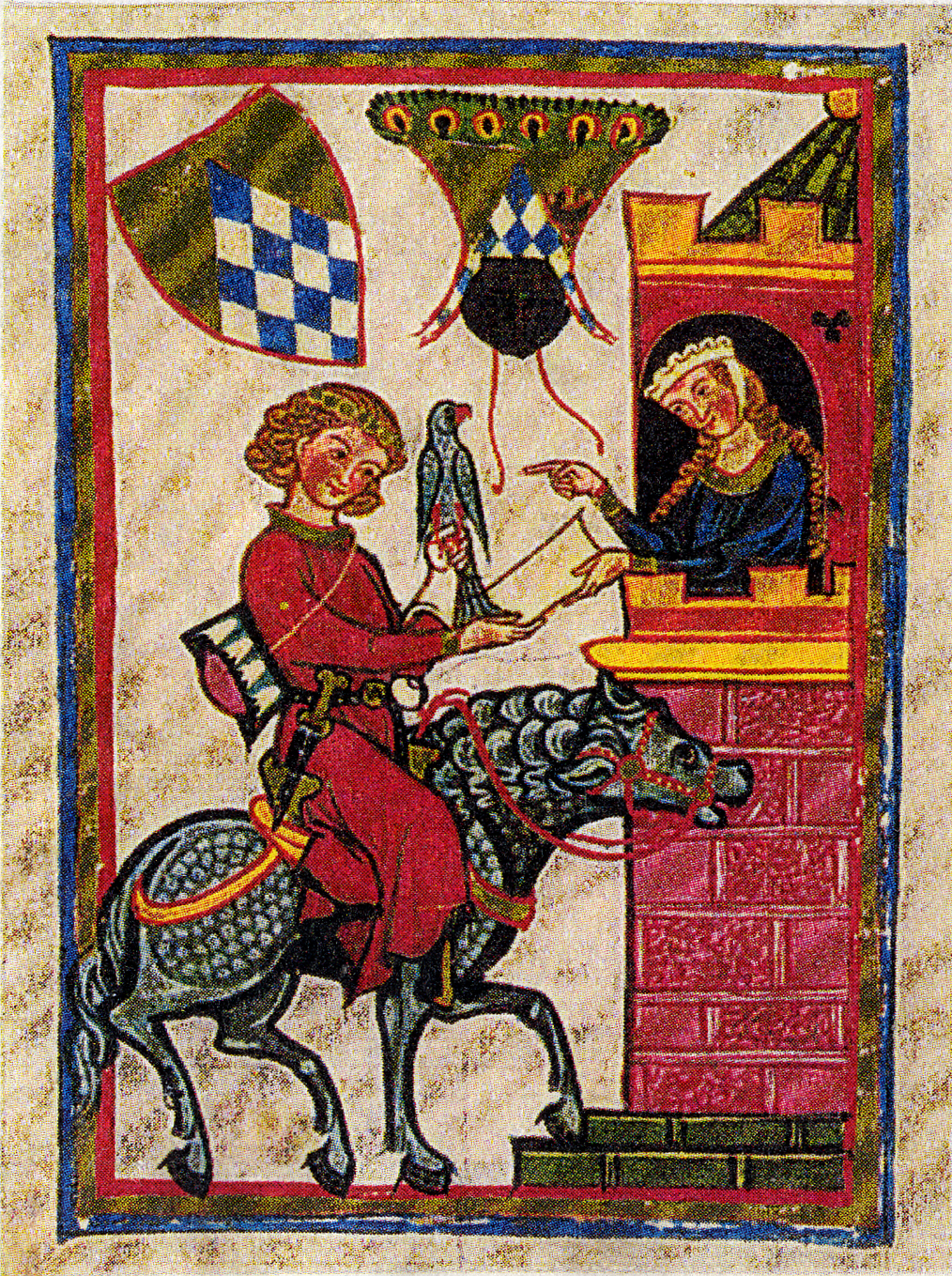 Codex Manesse, UB Heidelberg, Cod. Pal. germ. 848, fol. 164v: Leuthold von Seven